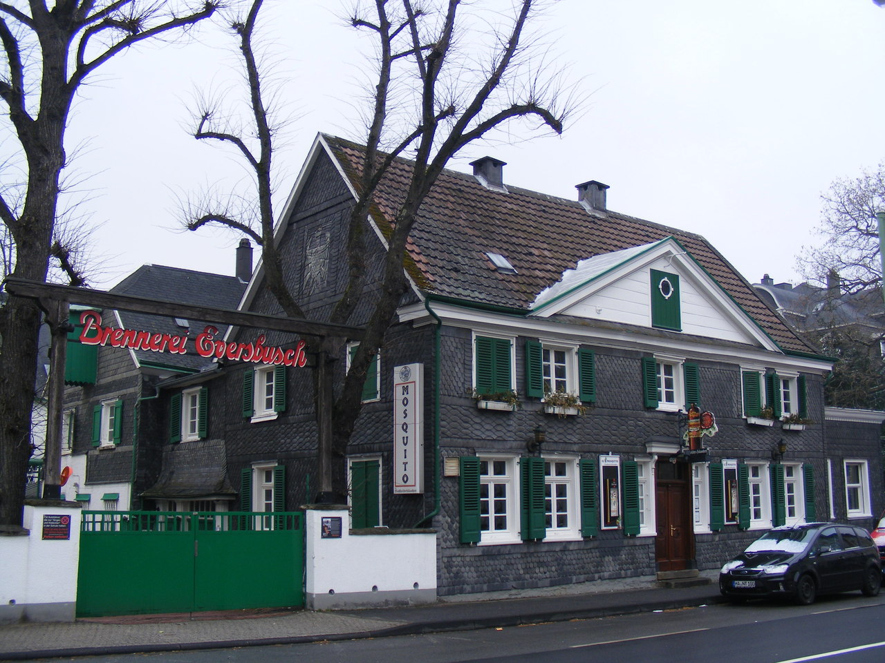 Hagen-Haspe: Berliner Straße 90, Brennerei Eversbusch, „Wachholderhäuschen“